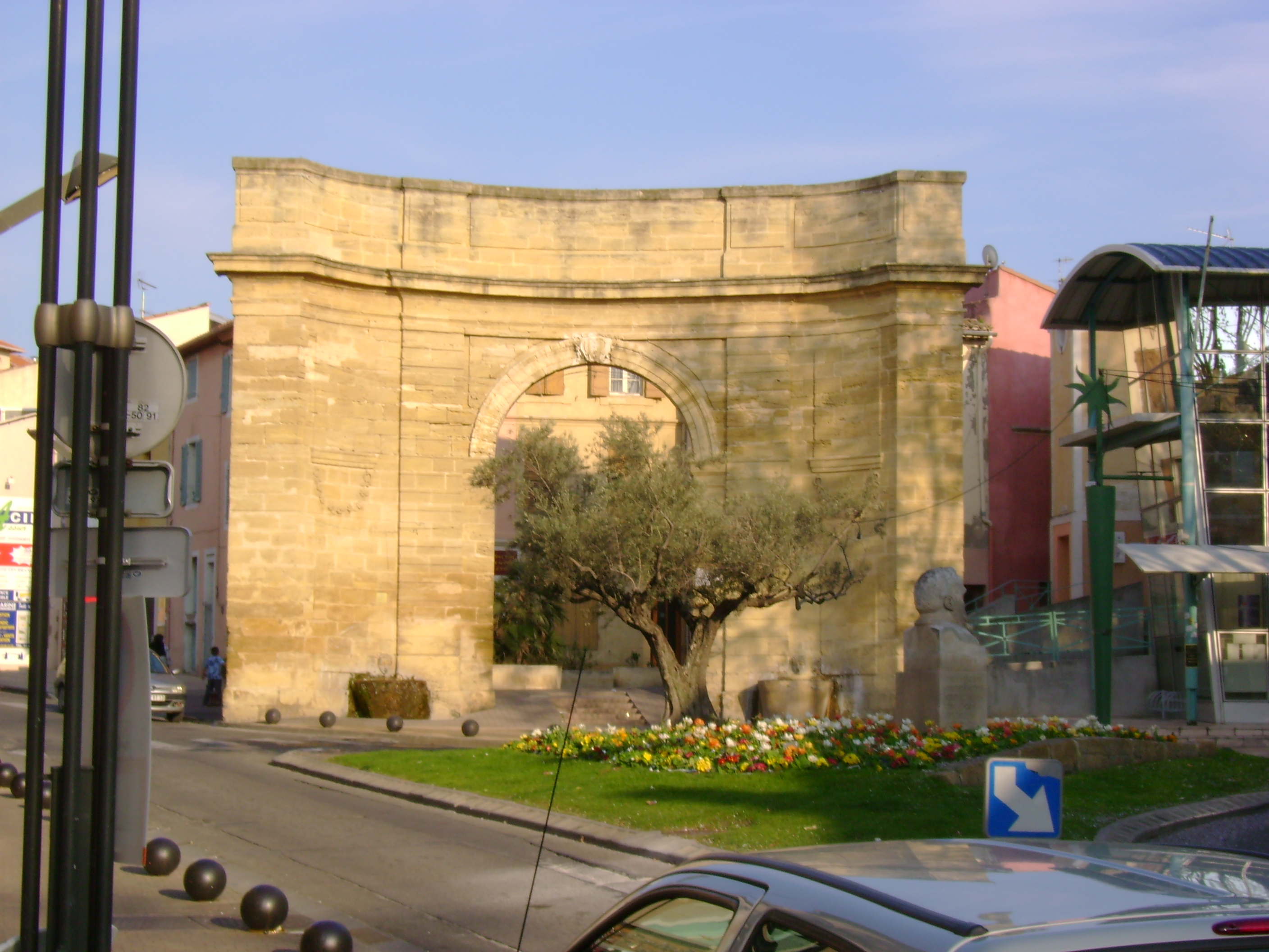 Porte d'Arles au centre ville l'Istres.